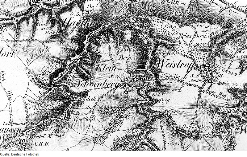 Original image description from the Deutsche Fotothek Klipphausen-Kleinschönberg. Oberreit, Sect. Dresden, 1821/22